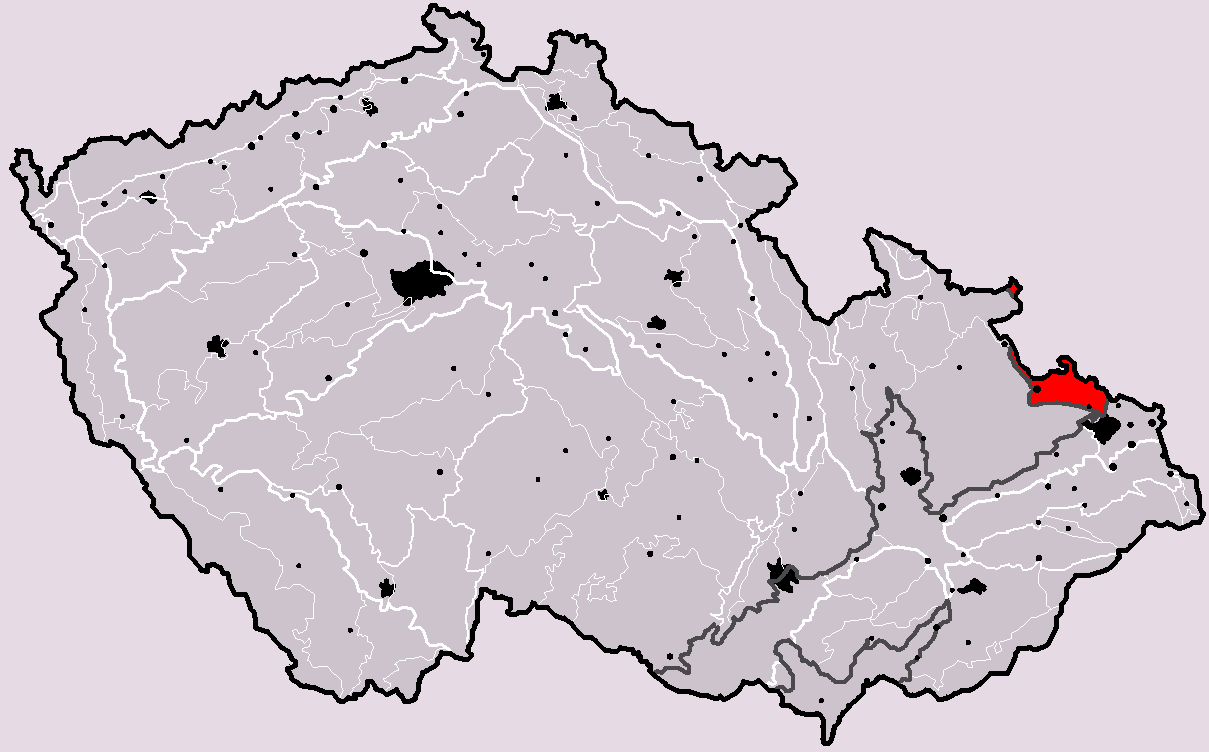 Poloha geomorfologického celku Opavská pahorkatina v rámci České republiky. Hercynský systém Epihercynské nížiny II Středoevropská nížina II1 (VII) Středopolské nížiny II1A (VIIA) Slezská nížina II1A-1 (VIIA-1) Opavská pahorkatina